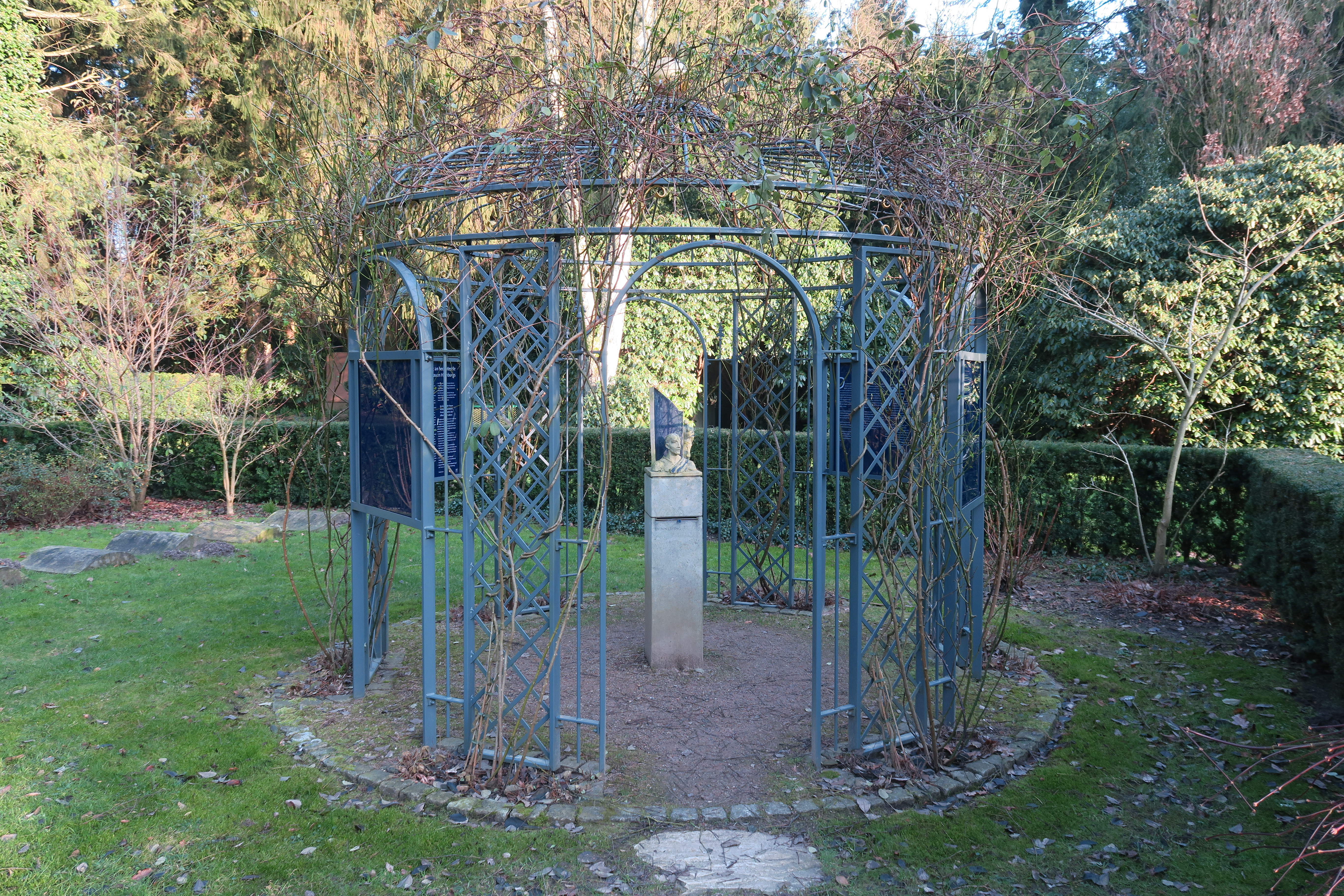 Rosenpavillon im Garten der Frauen, Ohlsdorfer Friedhof